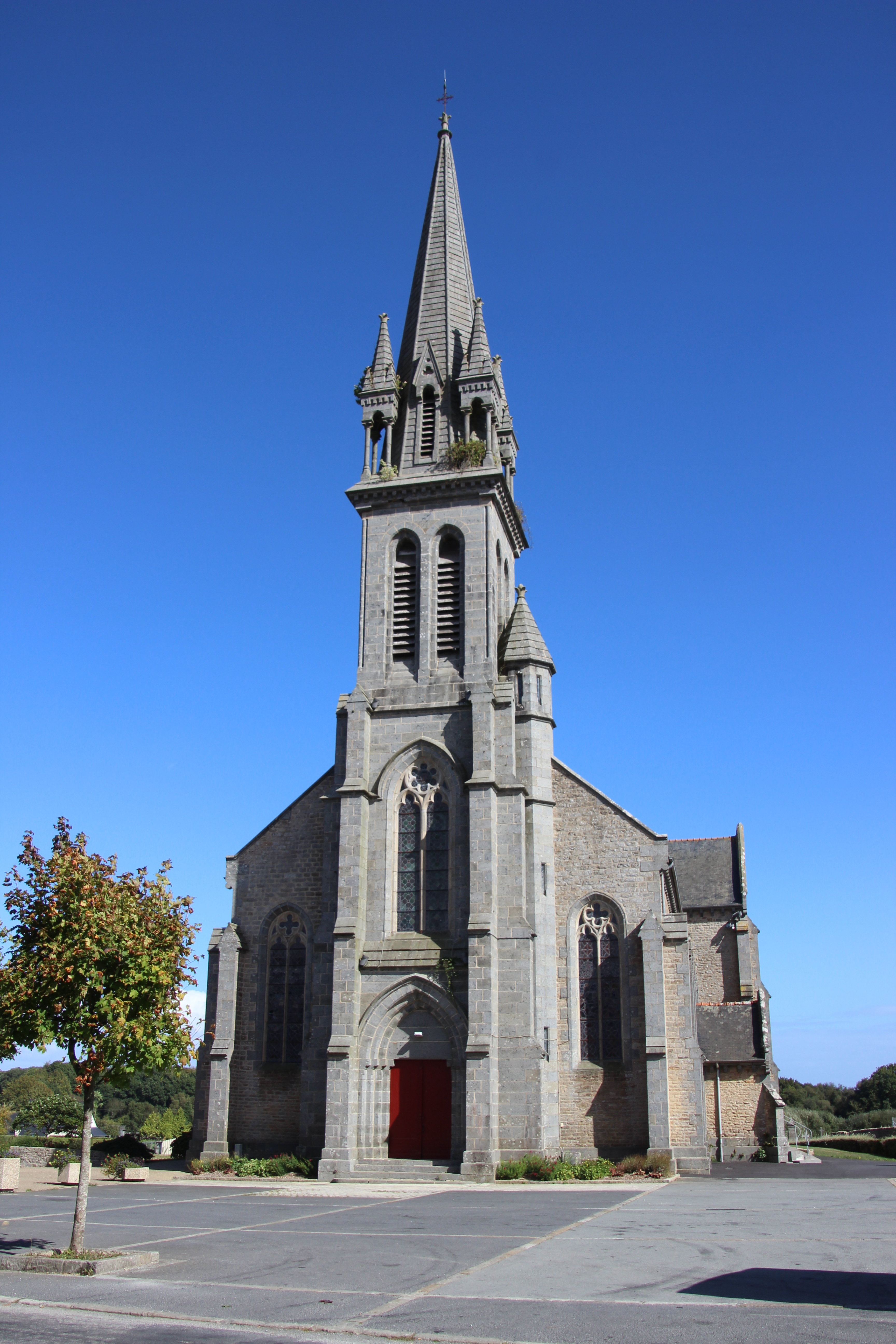 église de saint-vran